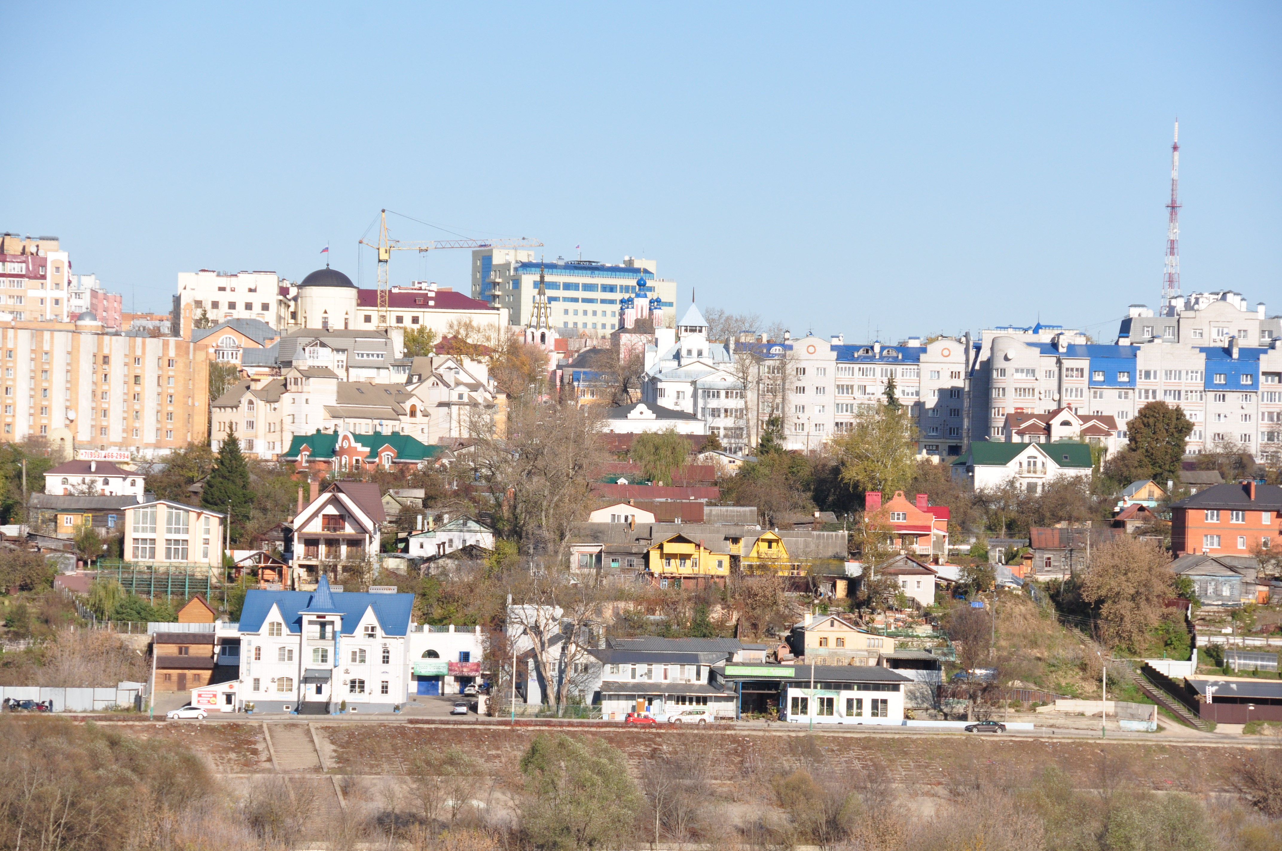 Kalouga - Калуга